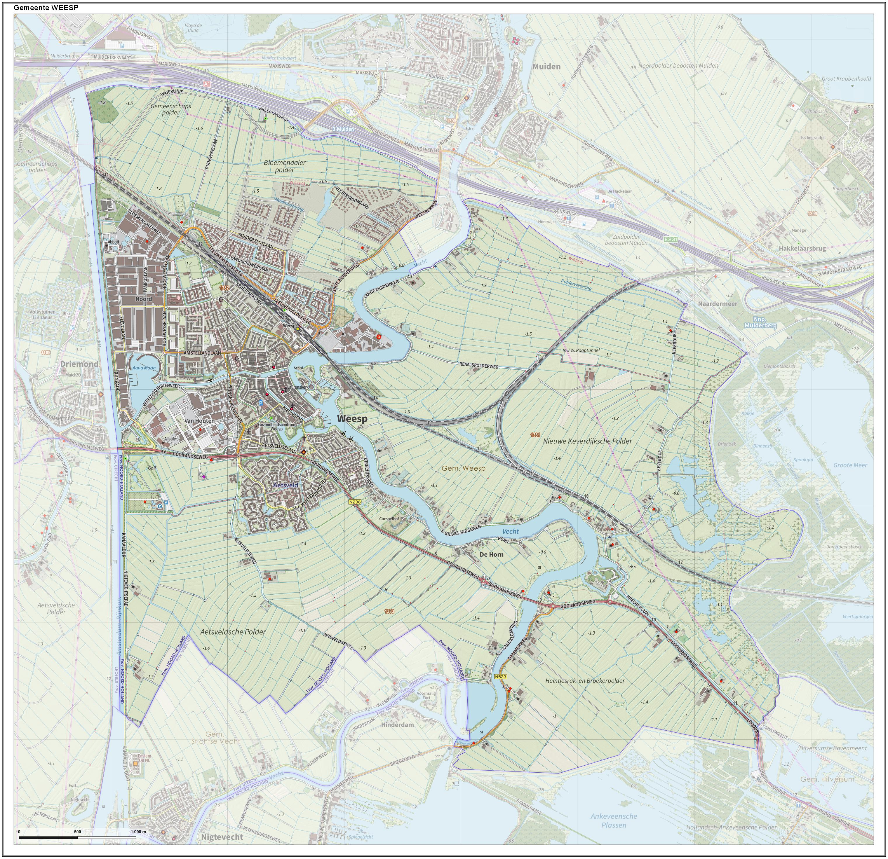 Topografische gemeentekaart. Resolutie: 400 pixels/km. Kaartbeeld samengesteld uit de open geodata van de Top10NL en Top25namen (Kadaster), Creative Commons-BY licentie. Gebouwvlakken uit open geodata BAG extract. Wegen uit de OpenStreetMap, OpenStreetMap community. Reliëfschaduw uit de Actuele Hoogtekaart AHN2. Samenstelling en kleurenschema: Jan-Willem van Aalst, met QGIS. Zie ook de Legenda.